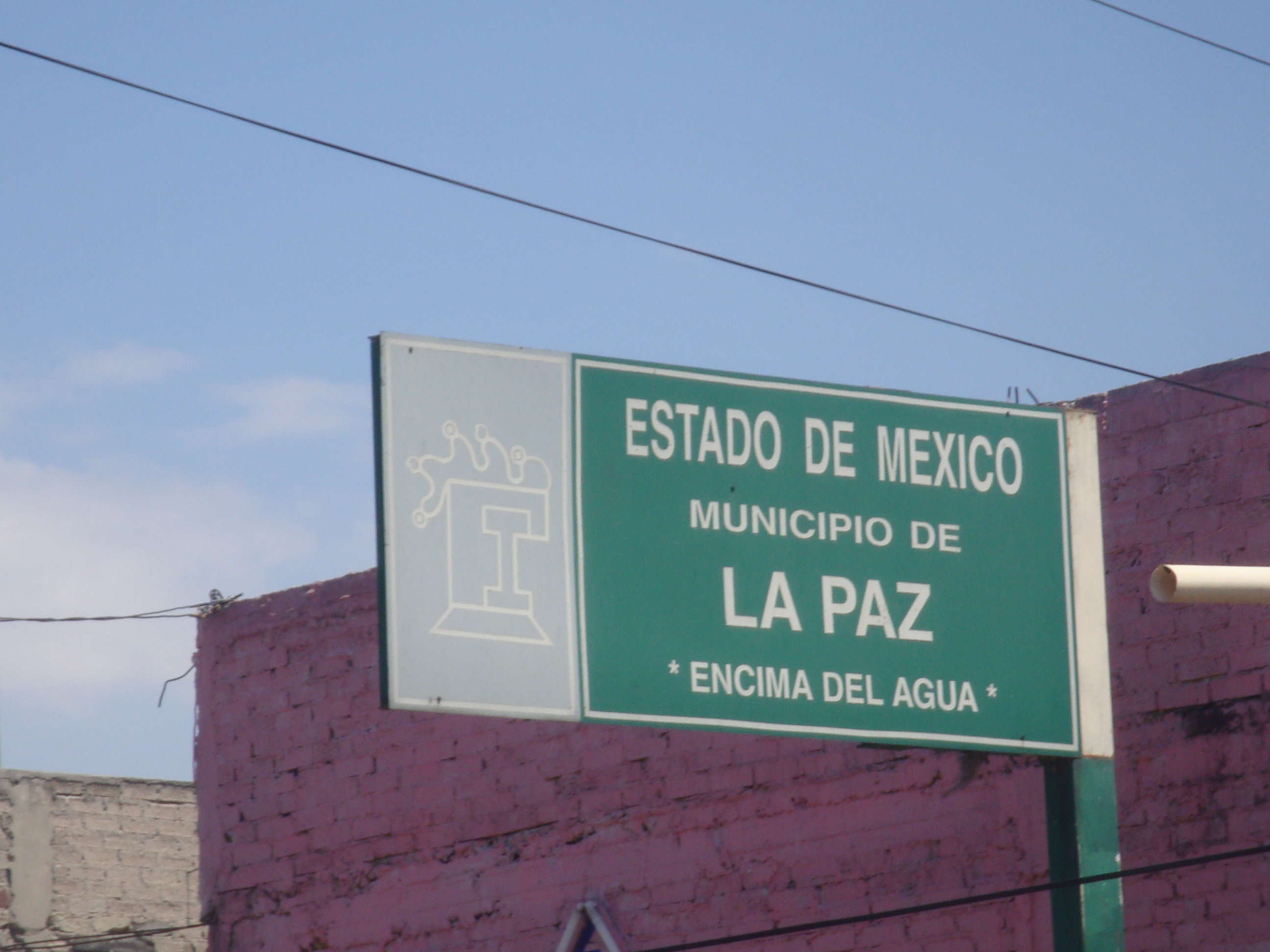 Letrero con el antiguo glifo del municipio de La Paz, correspondiente al pueblo de La Magdalena Atlícpac, que significa "Encima del agua".